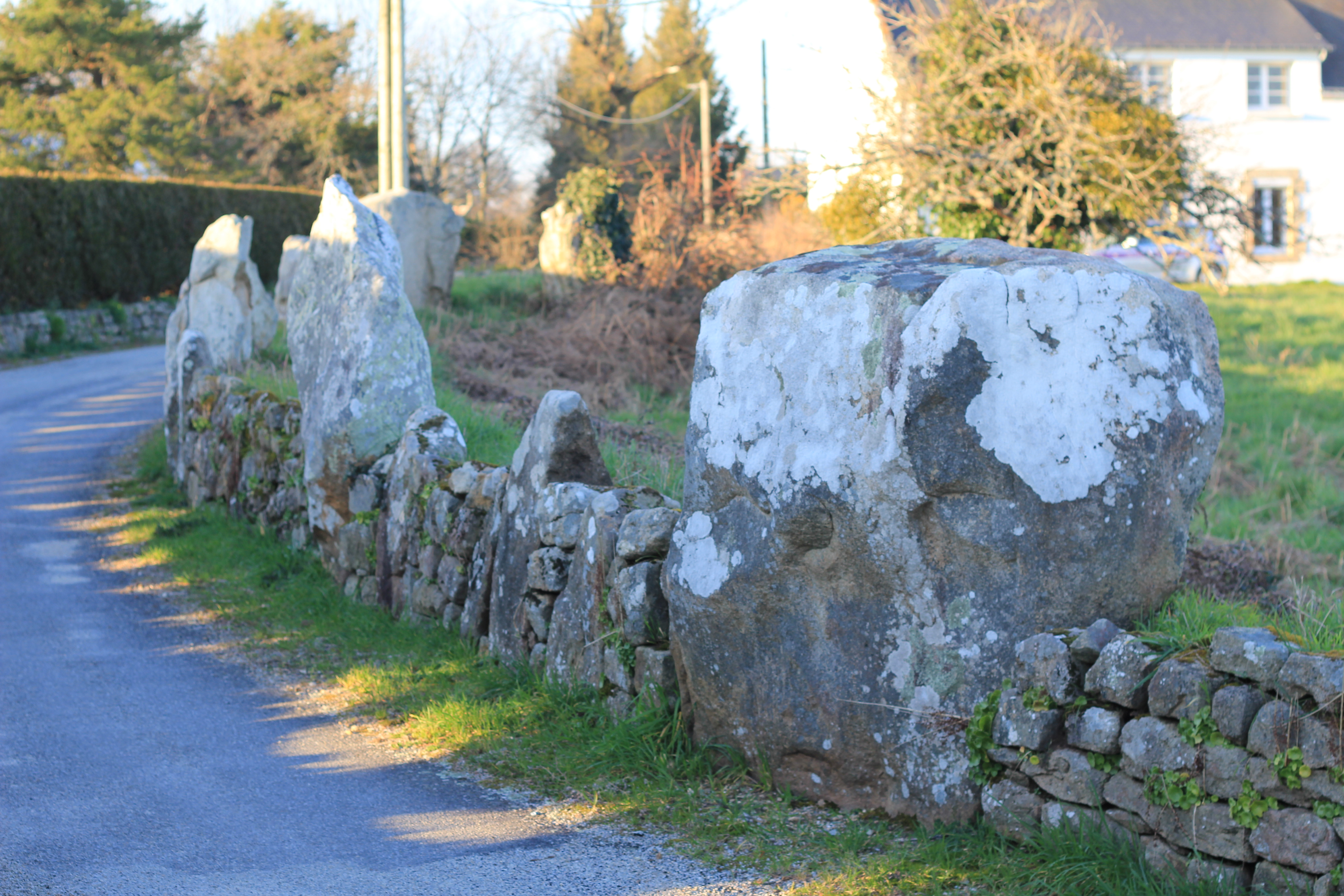 Restes de cromlech (Crucuny)